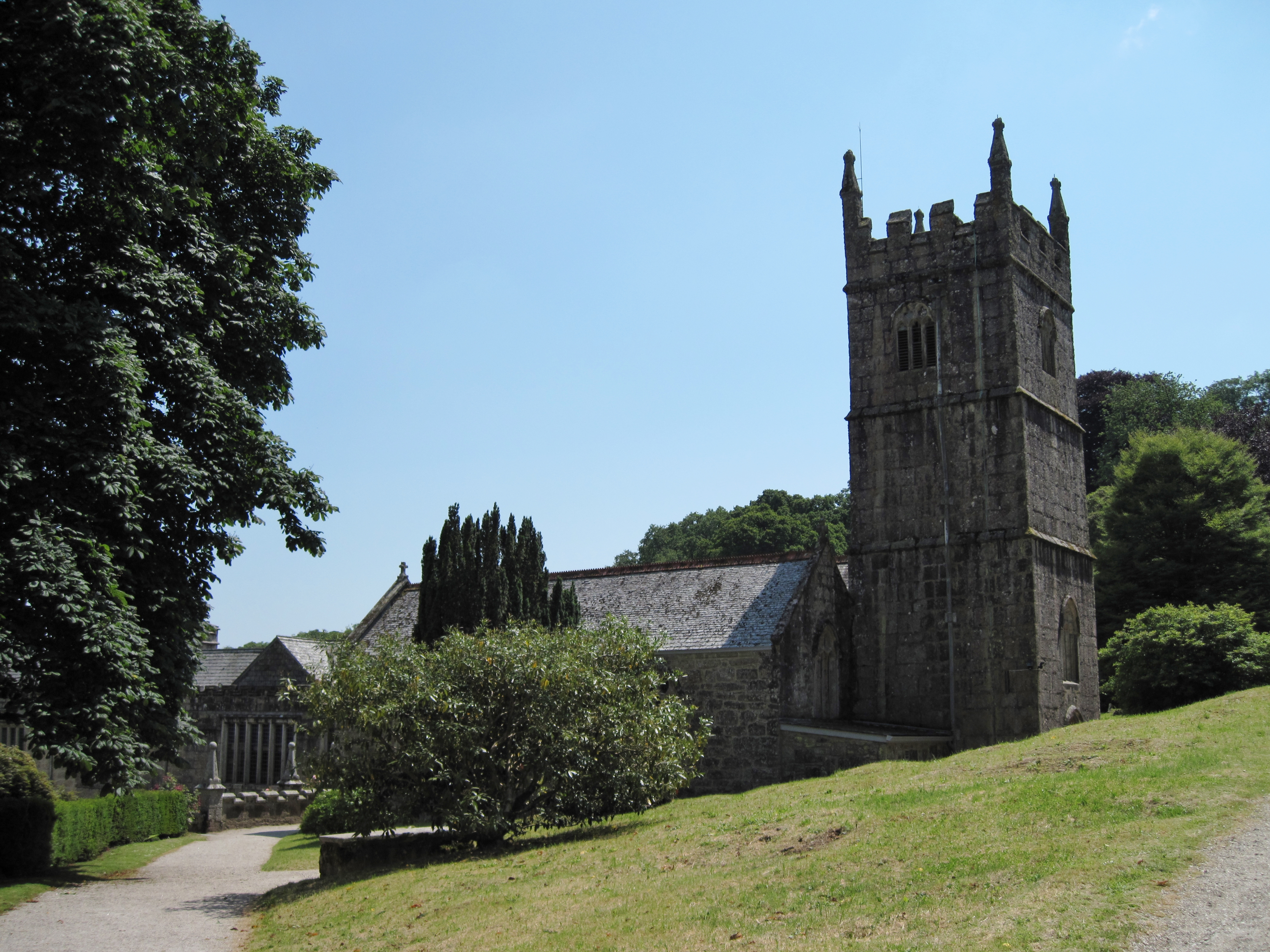 Kirche von Lanhydrock, einem Herrenhaus nahe Bodmin in Cornwall, England